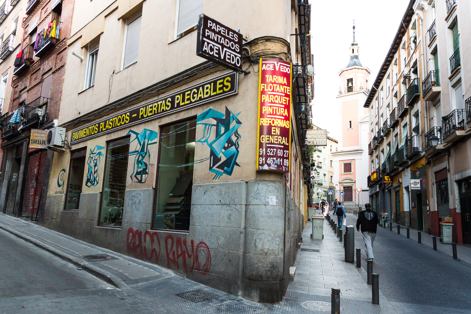 Calle de la Fe esquina con calle de Zurita, Madrid.